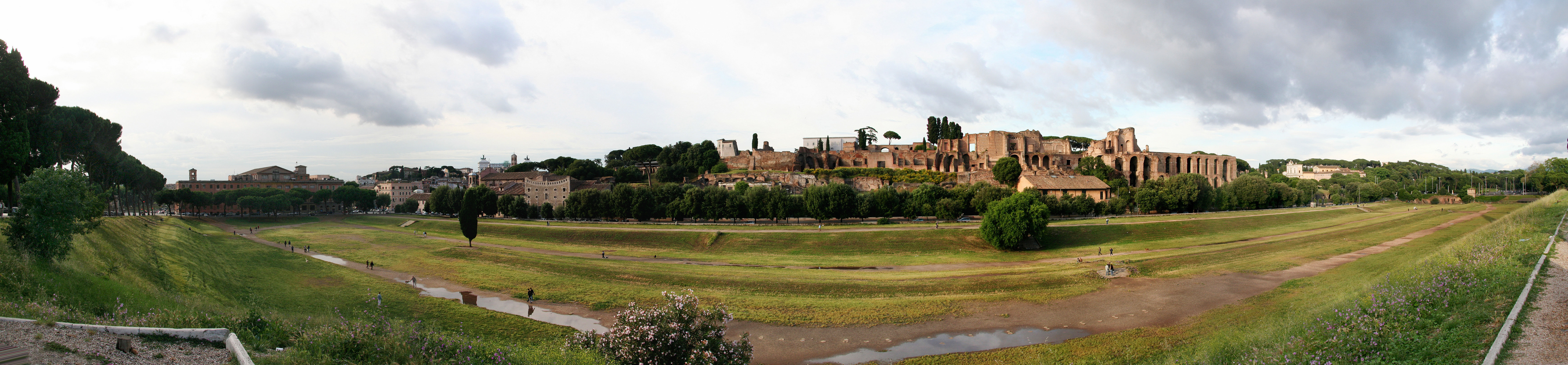 Panorama vom Circus Maximus